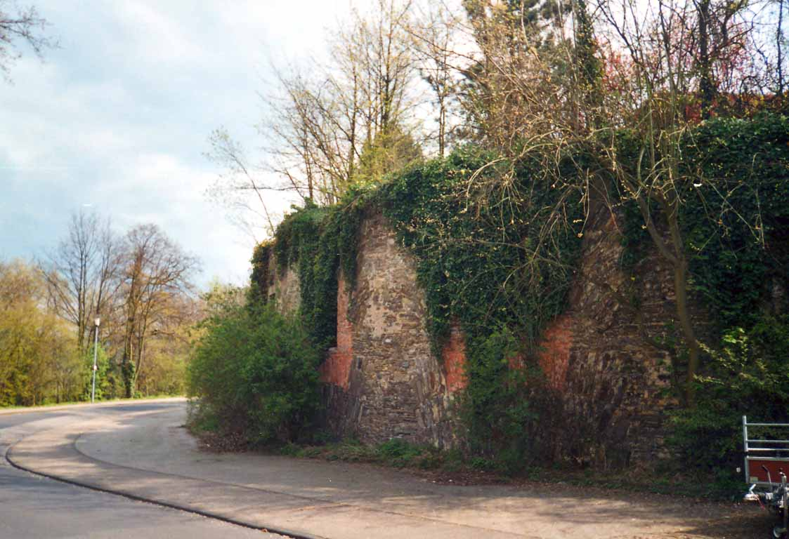 Reste des 1964 zerstörten Reduits der Feste Alexander.